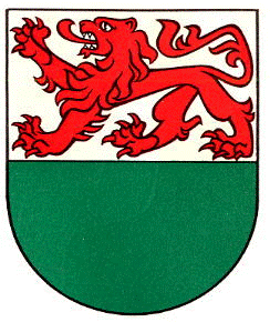 Wappen von Kesswil